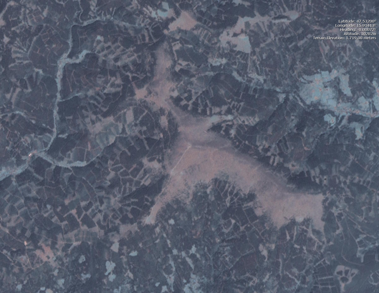 Satellitenbild des Berges Wechsel aus 10.000 Metern Höhe - inklusive Koordinaten. Erstellt mit dem Programm NASA World Wind.